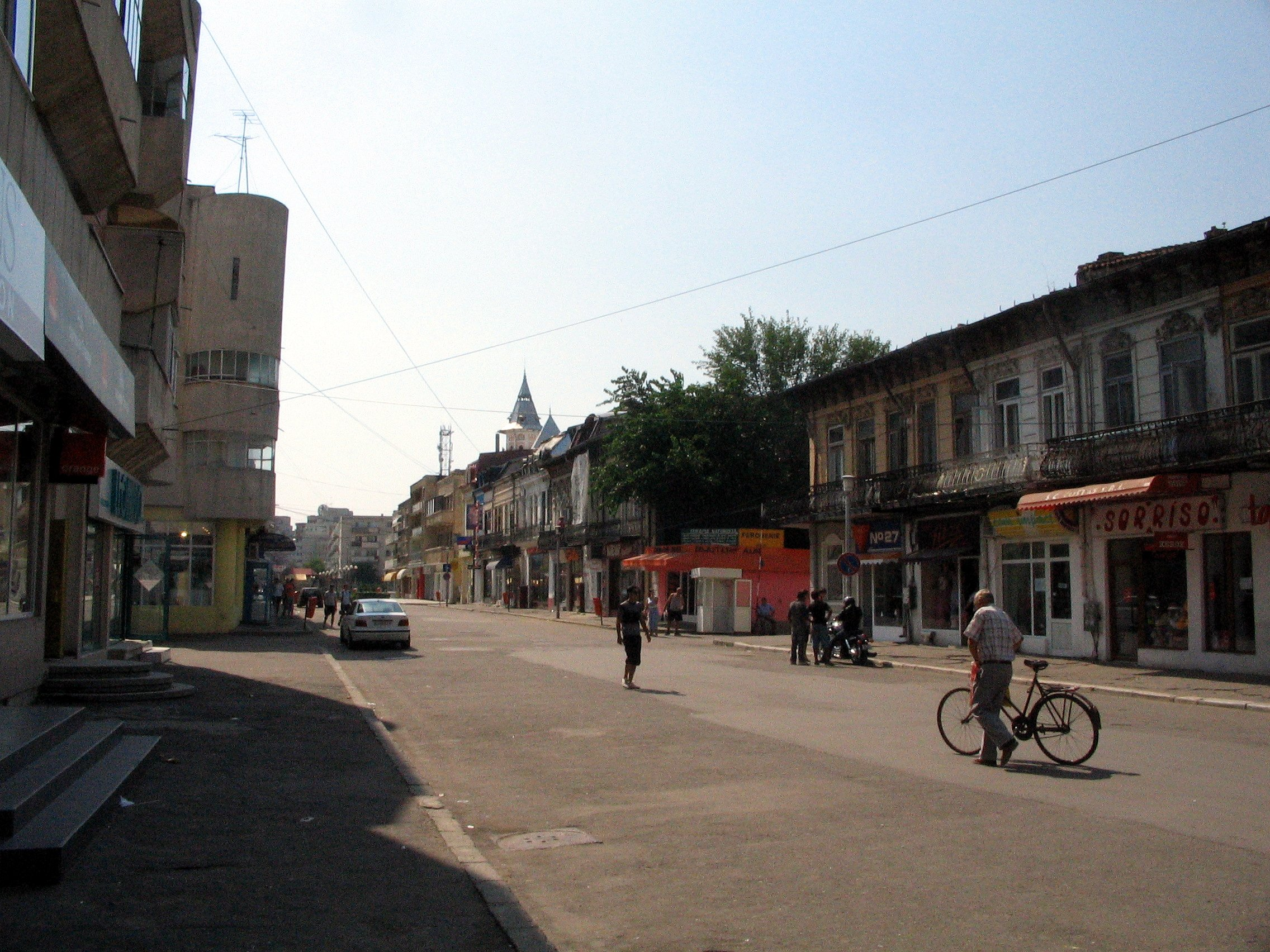 Cuza vodă street, Buzău, Romania